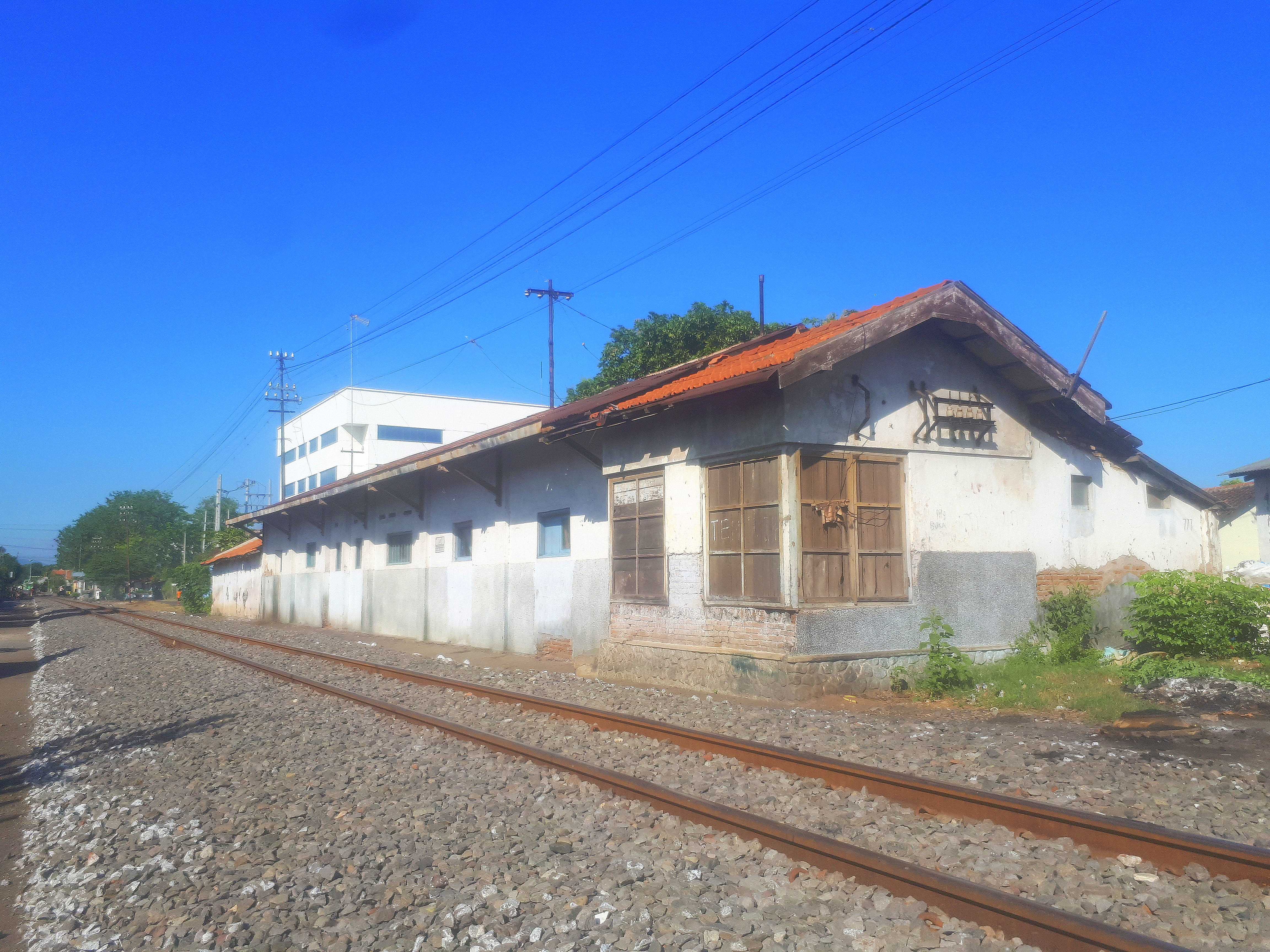 Tampak luar Stasiun Jati, 2020